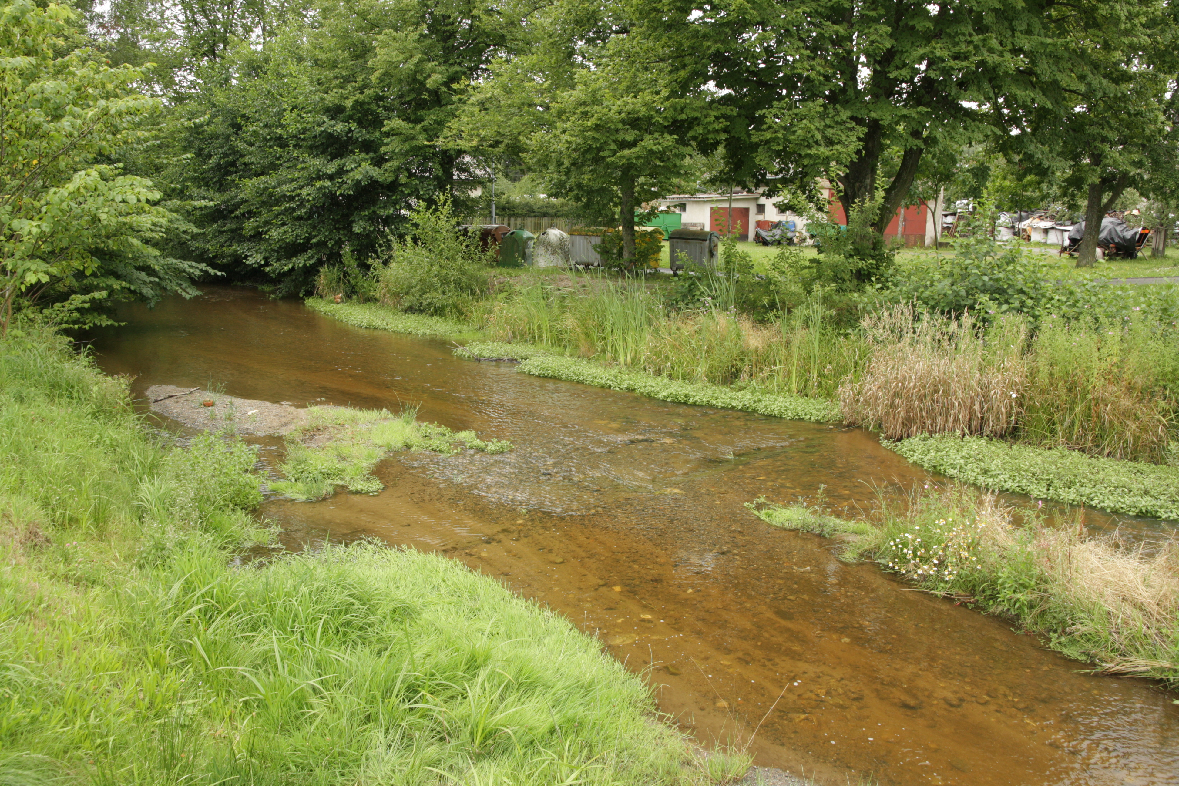 Světnov - Stržský potok u kamenného mostu